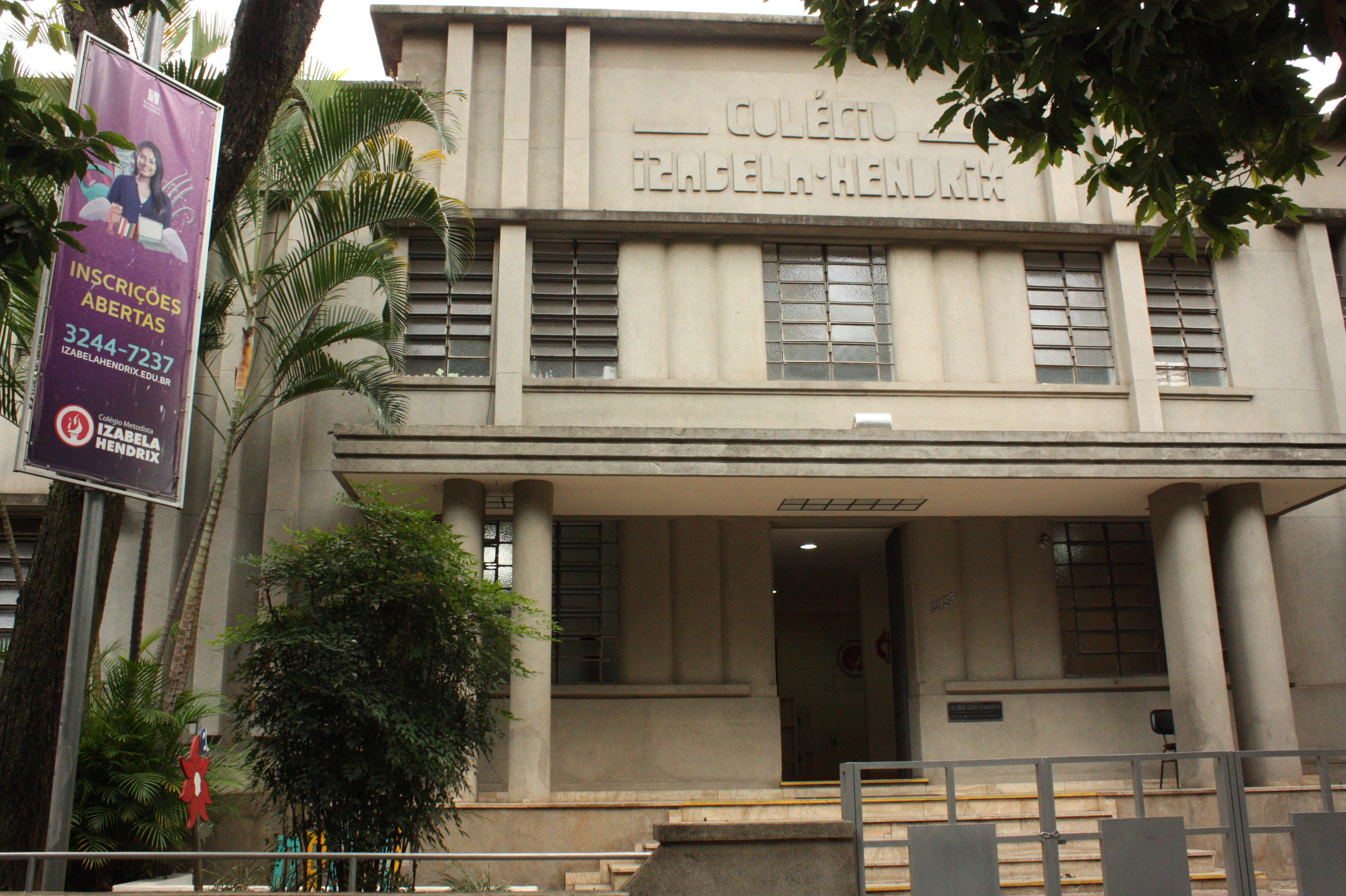 Fachada do Colégio Metodista Izabela Hendrix, localizado na Rua Espírito Santo, 2055